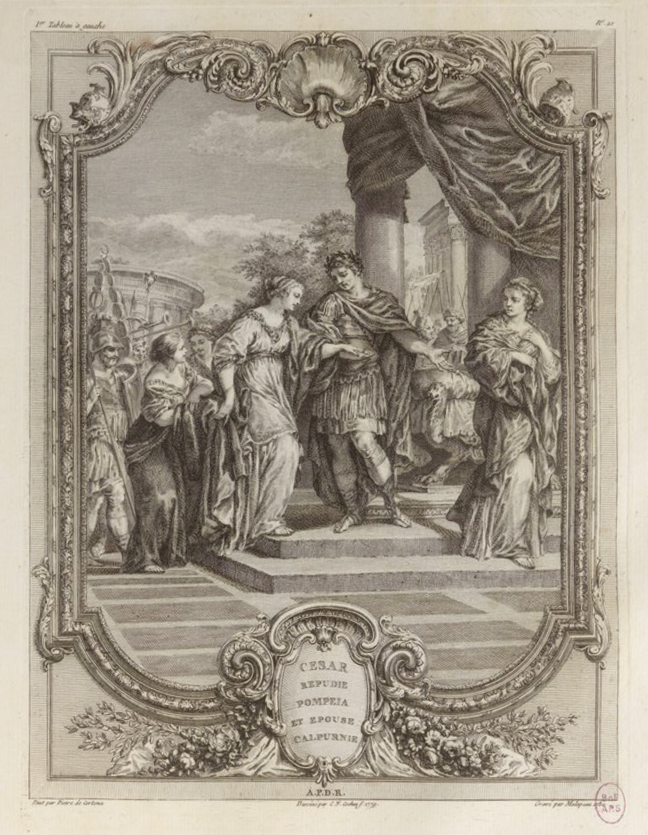 Cesar répudie Pompeia et épouse Calpurnie. Illustration du livre Voyage pittoresque de la France : avec la description de toutes ses provinces. Ouvrage national, dédié au Roi, orné d'un grand nombre de gravures exécutées avec le plus grand soin, d'après les dessins des meilleurs artistes. Dauphiné [fin] ; Ile-de-France, Paris [début], par Une Société de gens de lettres [par de La Borde, Béguillet, Guettard, etc.], Éditeur : A Paris, de l'imprimerie de Monsieur. Chez Lamy, libraire, quai des Augustins, n° 26. M. DCC. LXXXIV-M. DCC. LXXXXII, 1784-1792.